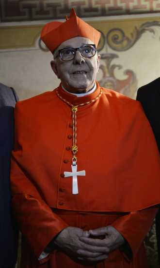 Cardenal de la Iglesia catolica